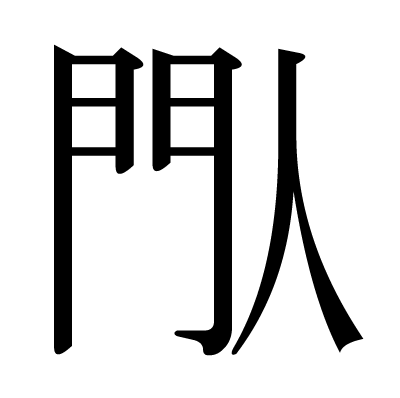 ものかげからきゅうにとびだしてひとをおどろかせるときにはっするこえと読む漢字。長い。